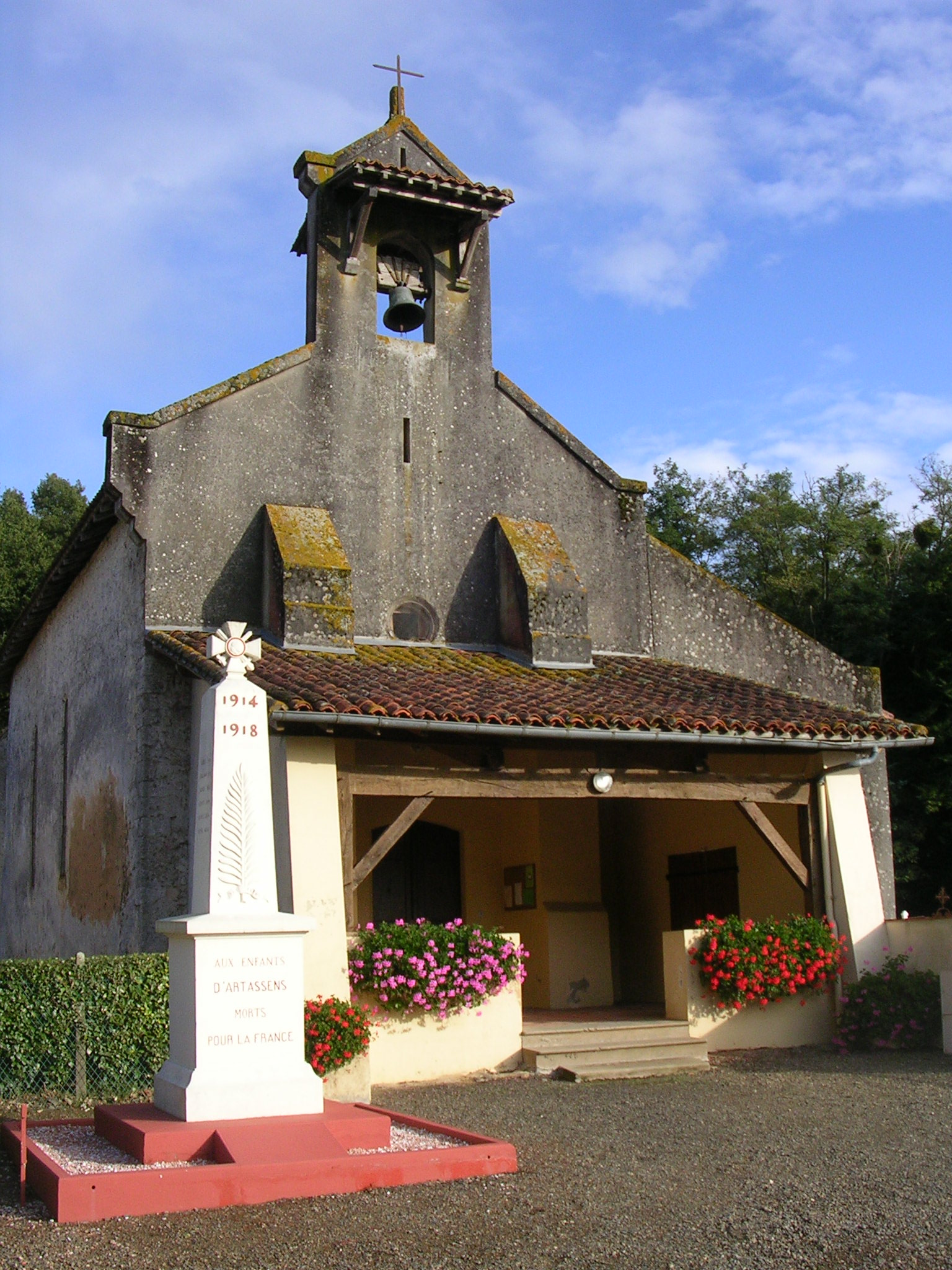 Église Saint-Jean-Baptiste d'Artassenx, dans le département français des Landes